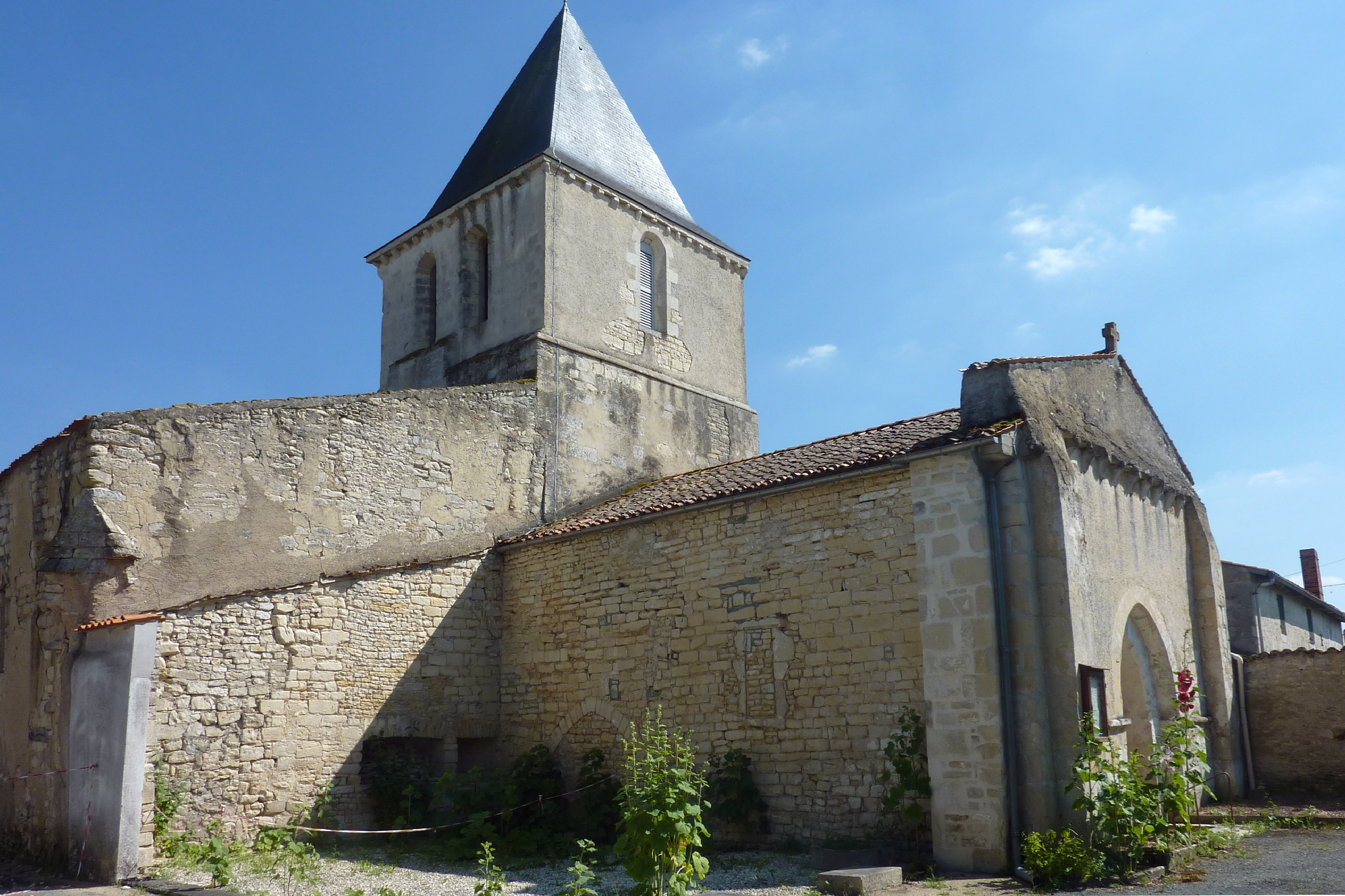 Église Saint-Gérard La Laigne Charente-Maritime France